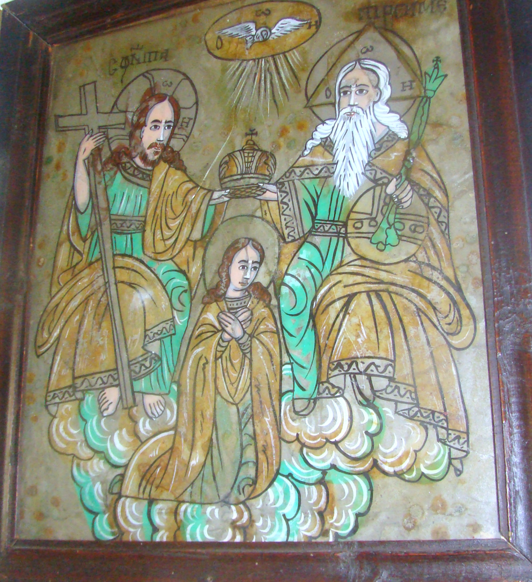 Muzeul de icoane pe sticlă „Pr.Zosim Oancea” din Sibiel